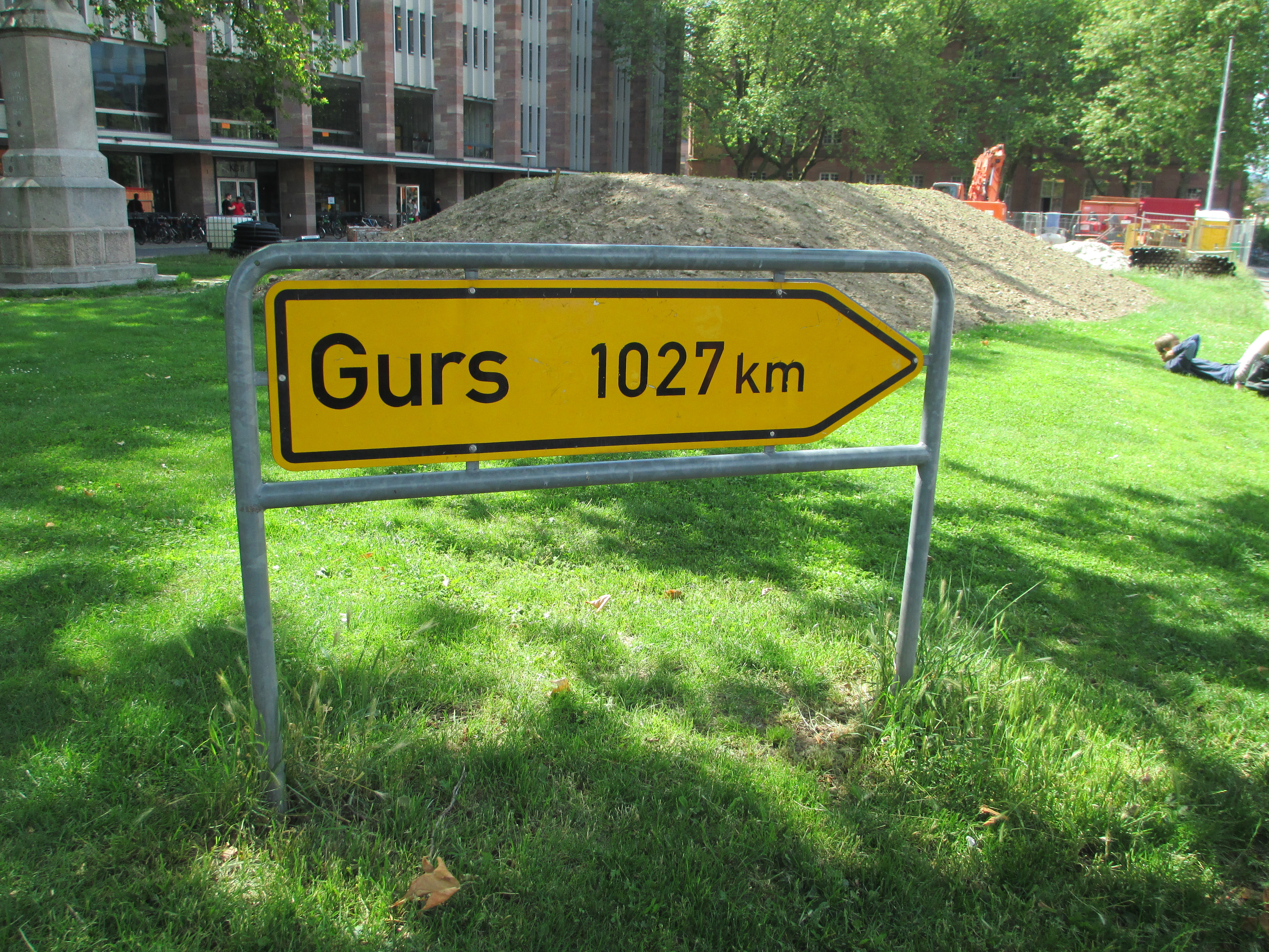 אתר זיכרון בפרייבורג לגירוש יהודי פרייבורג והסביבה למחנה גירס בהרי הפירנאים ב-1940. רבים מתו בגלל התנאים הקשים במחנה ואת השאר שלחו ב-1942 להשמדה באושוויץ ומידאנק. השלט מראה את המרחק בין פרייבורג לגירס.